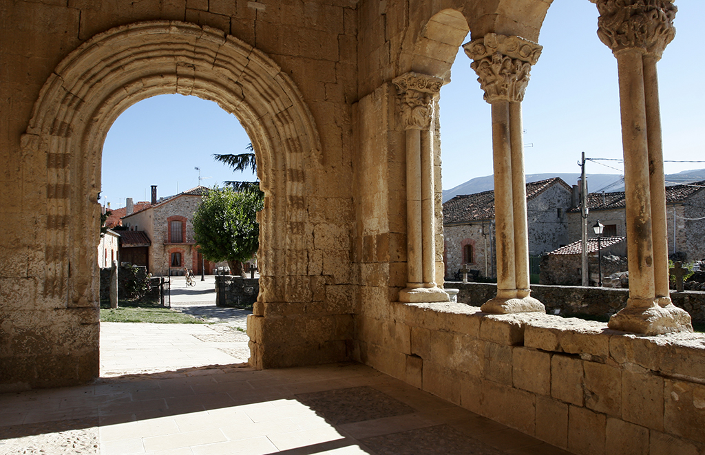 Galería de la Iglesia de San Miguel, Siglo XII (Sotosalbos; Segovia; España)